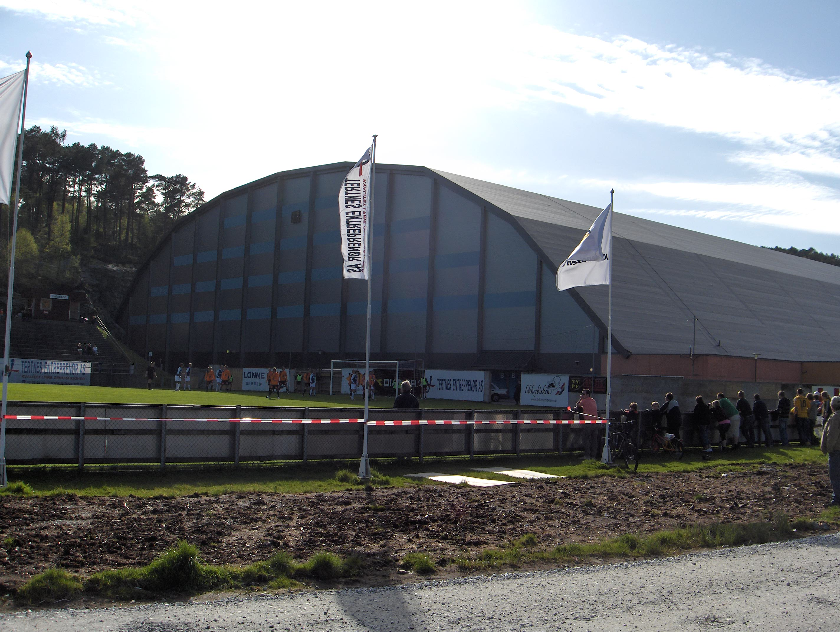 Vestlandshallen an indoor arena in Bergen, Norway